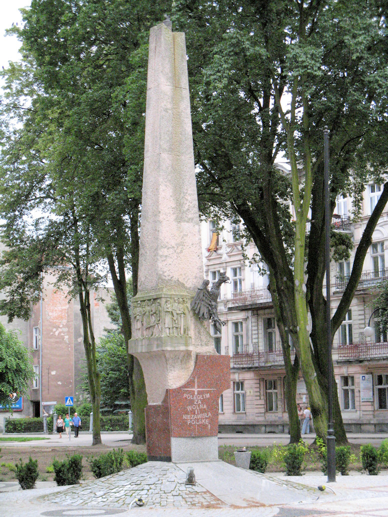 Pomnik "Poległym za wolną i niezawisłą Polskę" w Parku Solidarności w Ełku